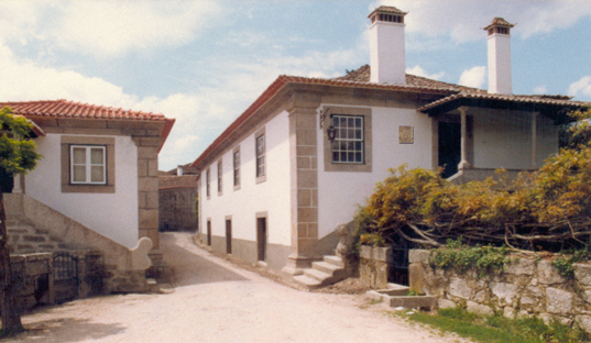 Casa da Torre (Oliveira do Conde), Portugal